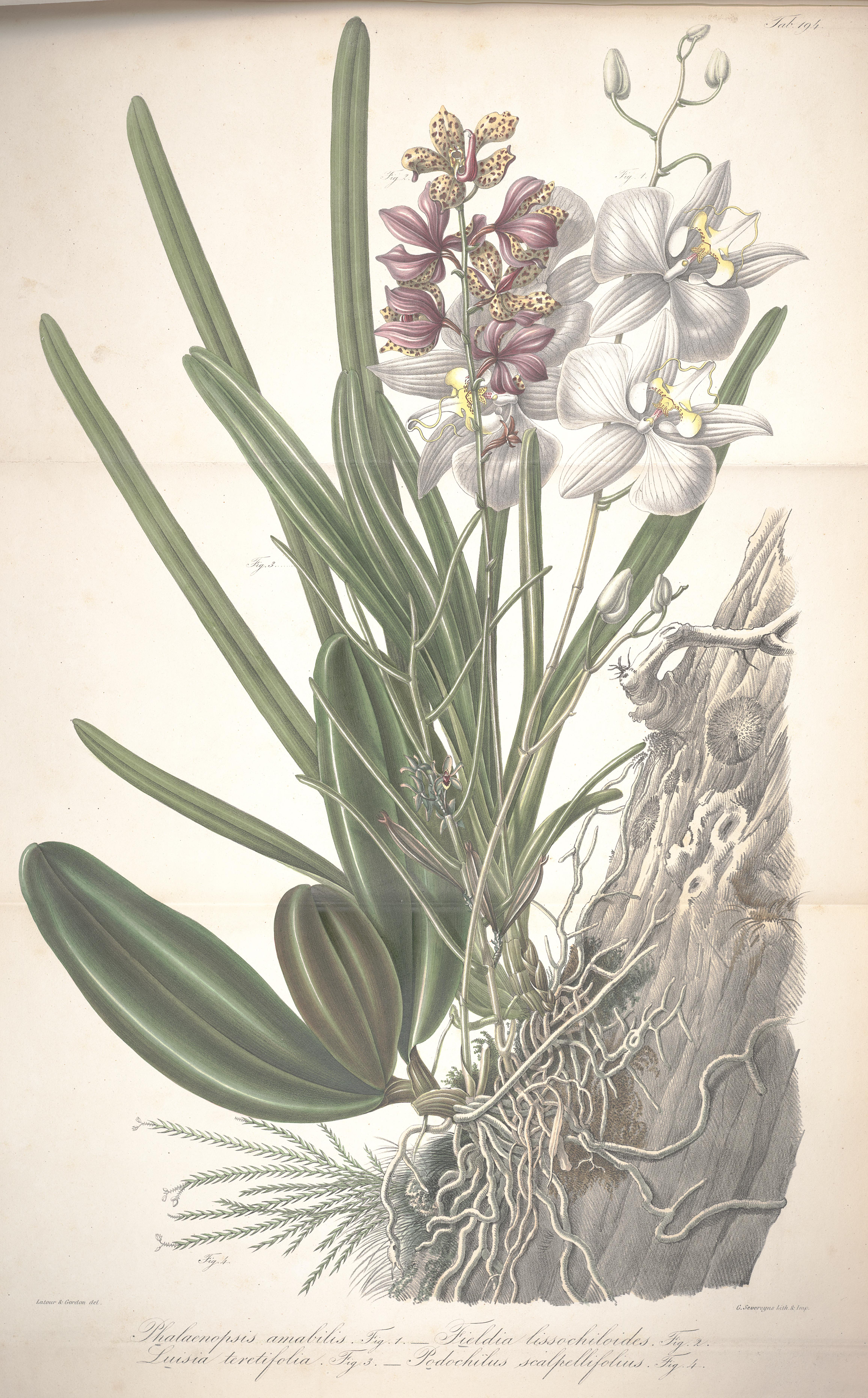 Fig. 1: Phalaenopsis amabilis; Fig. 2: Vandopsis lissochiloides (as Fieldia lissochiloides); Fig. 3: Luisia teretifolia; Fig. 4: Podochilus scalpelliformis